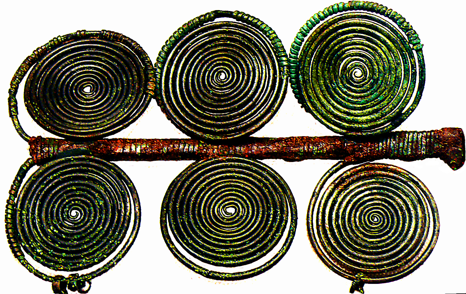 Fíbula de anteojos del bronce final de la península Ibérica